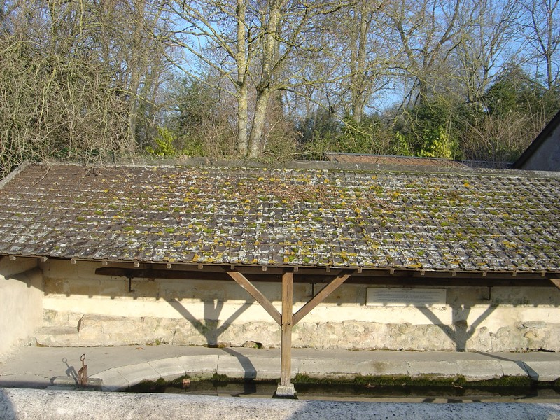 La source de l'Aubance à Louerre 49700